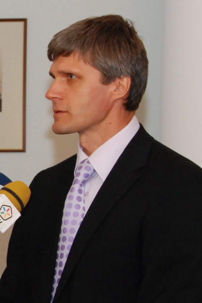 Rēzeknes domes priekšsēdētājs Aleksandrs Bartaševičs Ministru kabinets, Ministru prezidentu zāle, 30.07.2009. Foto: Valsts kanceleja